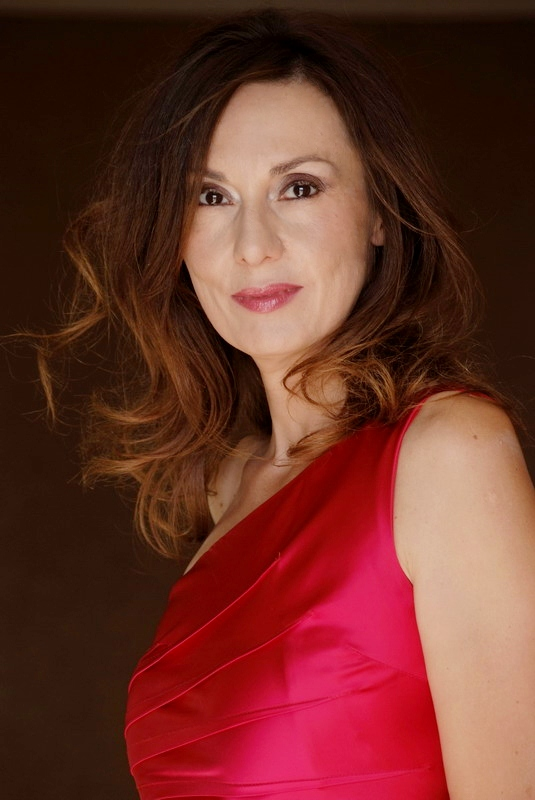 photo de Simona Caparrini